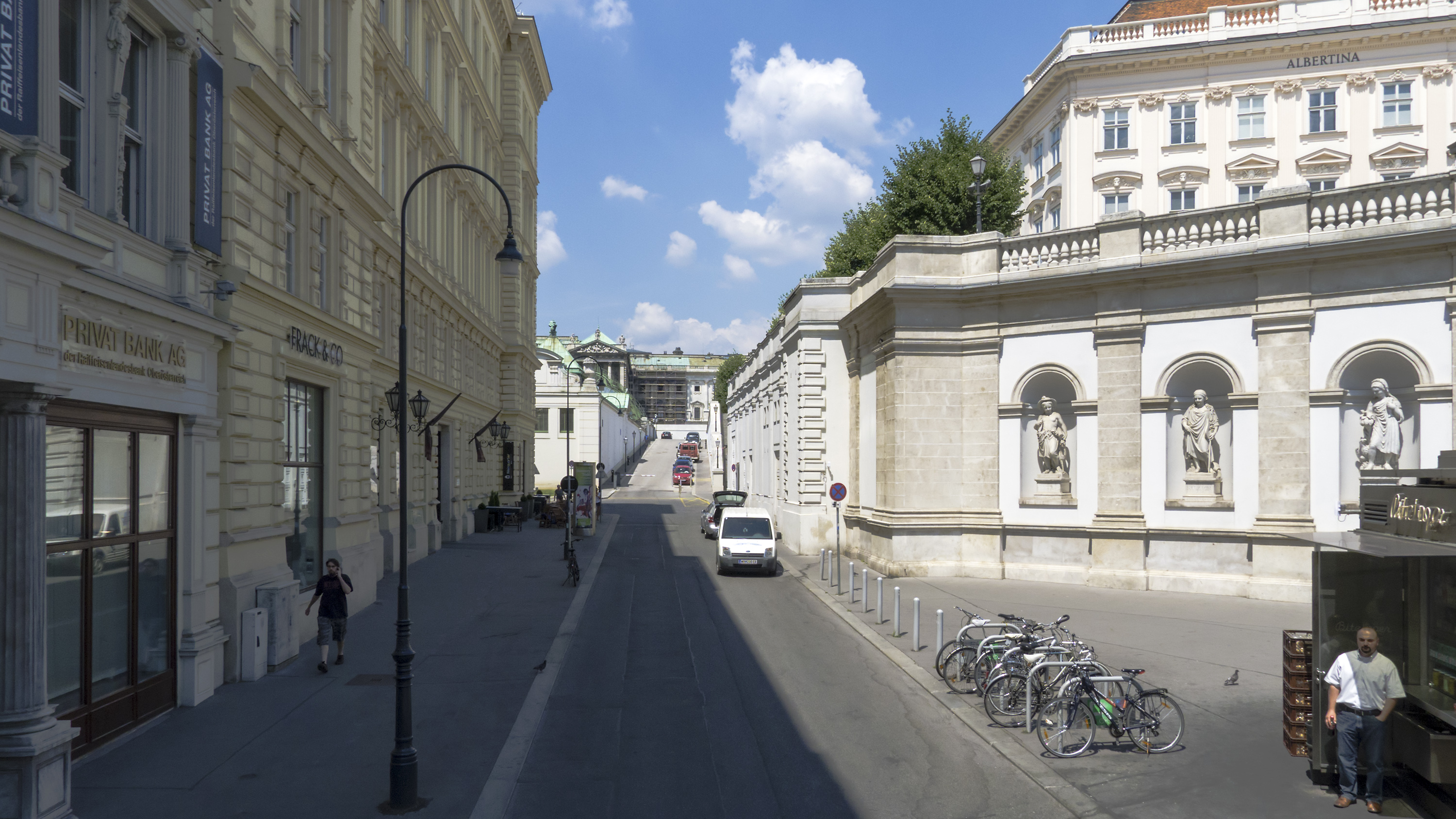 Hanuschgasse in Wien 1 bei Nr. 1 Richtung Nordwesten